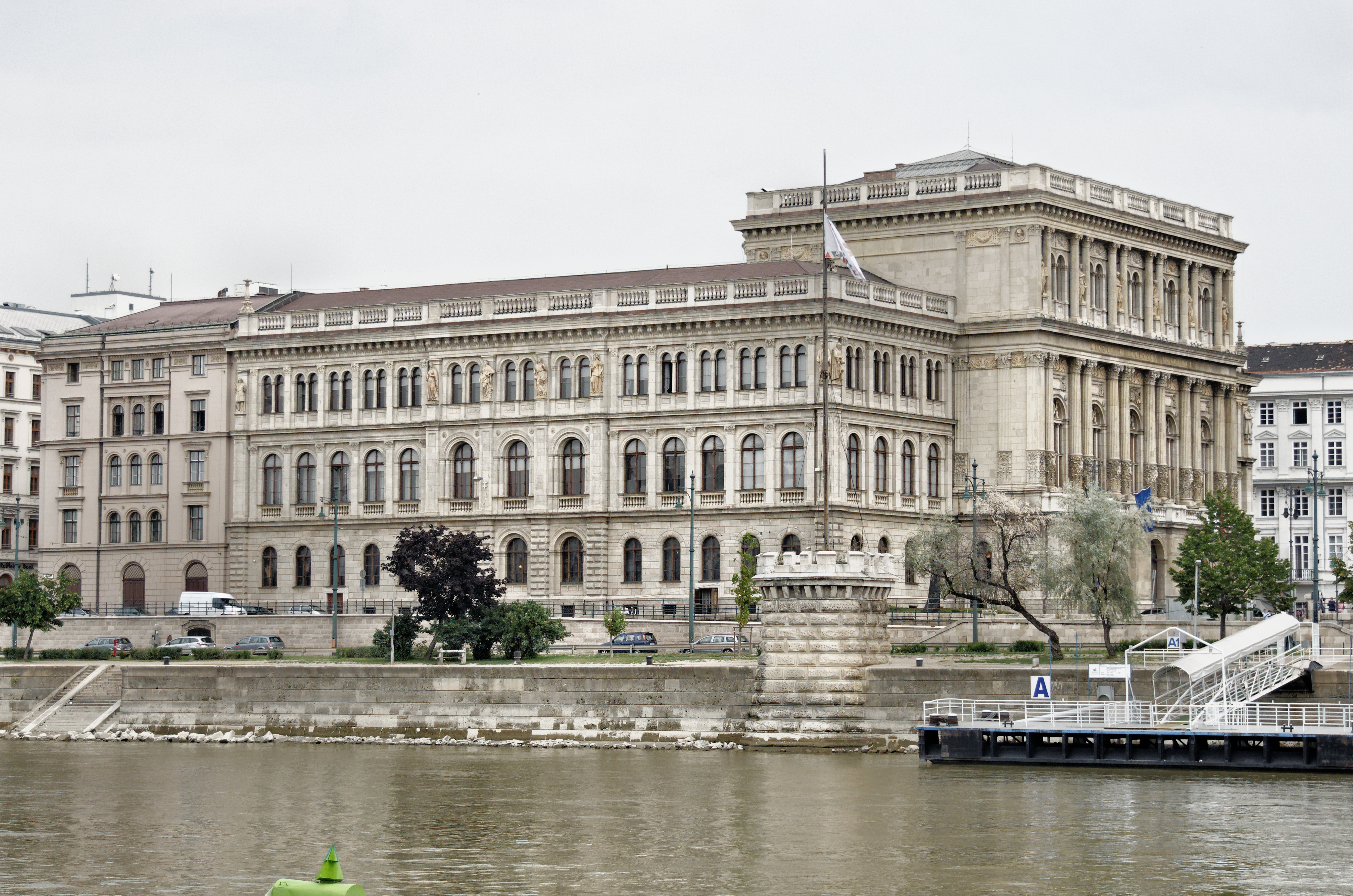 Académie des sciences hongroise, Place Roosevelt à Budapest